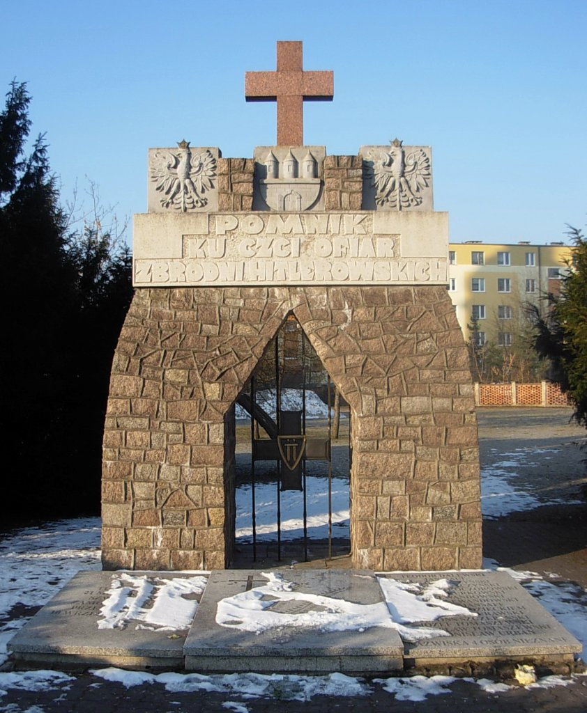 Pomnik poległych, rozstrzelanych Polaków na Szwederowie w 1939 r. - przed kościołem NMP Nieustającej Pomocy na Szwederowie w Bydgoszczy